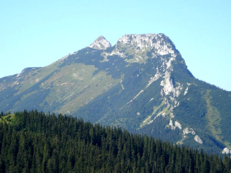 Giewont, Tatry. Widok od strony południowej z drogi na Kasprowy Wierch.